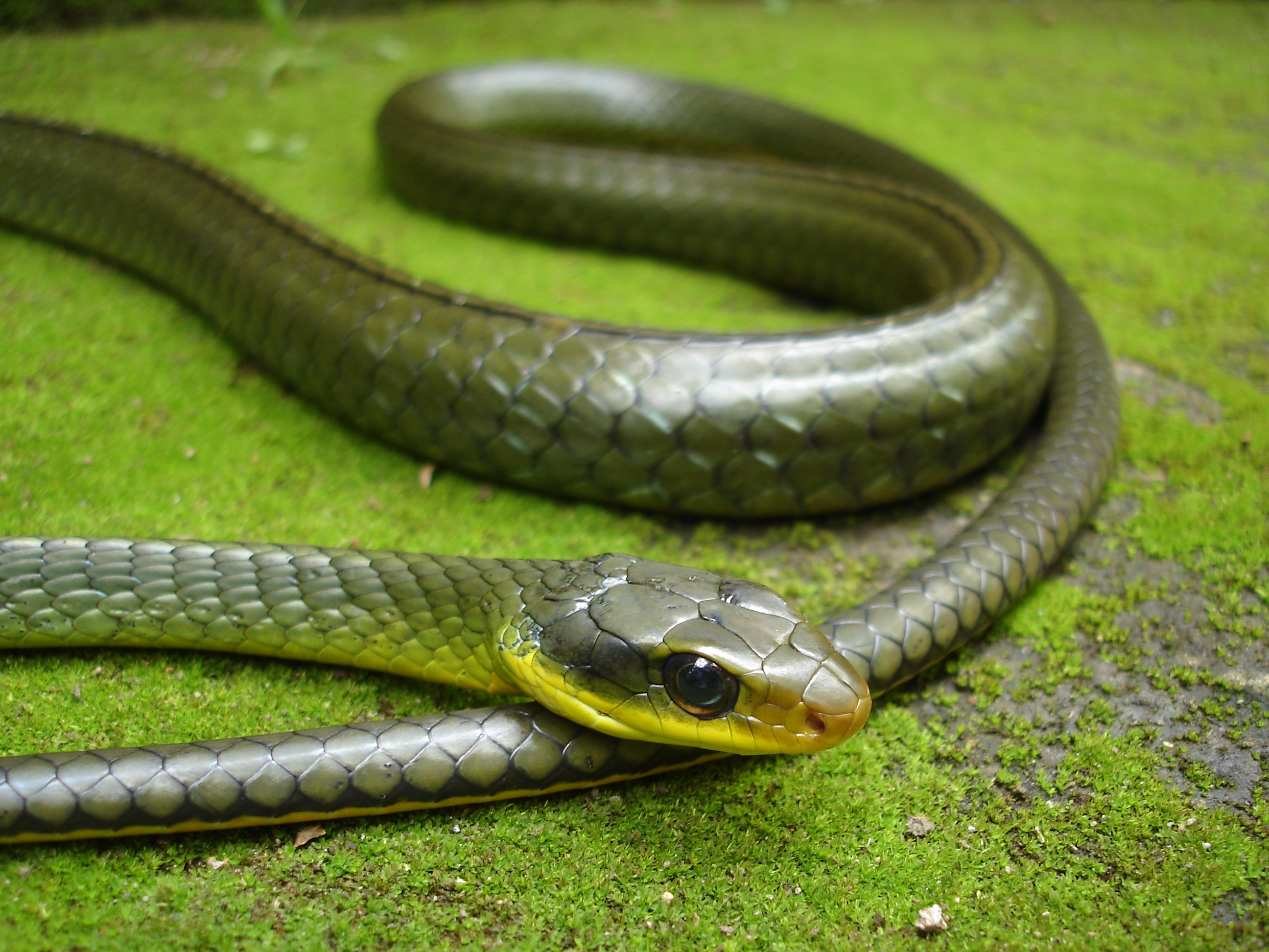 Cobra cipó em estado letárgico devido a temperatura da noite ter atingido 1ºc.